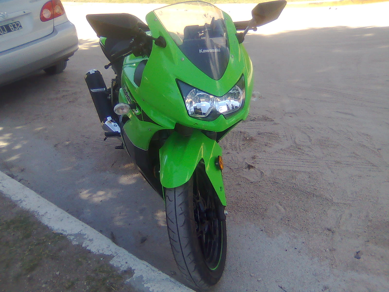 Kawasaki ninja en Cabalango, CBA, Argentina